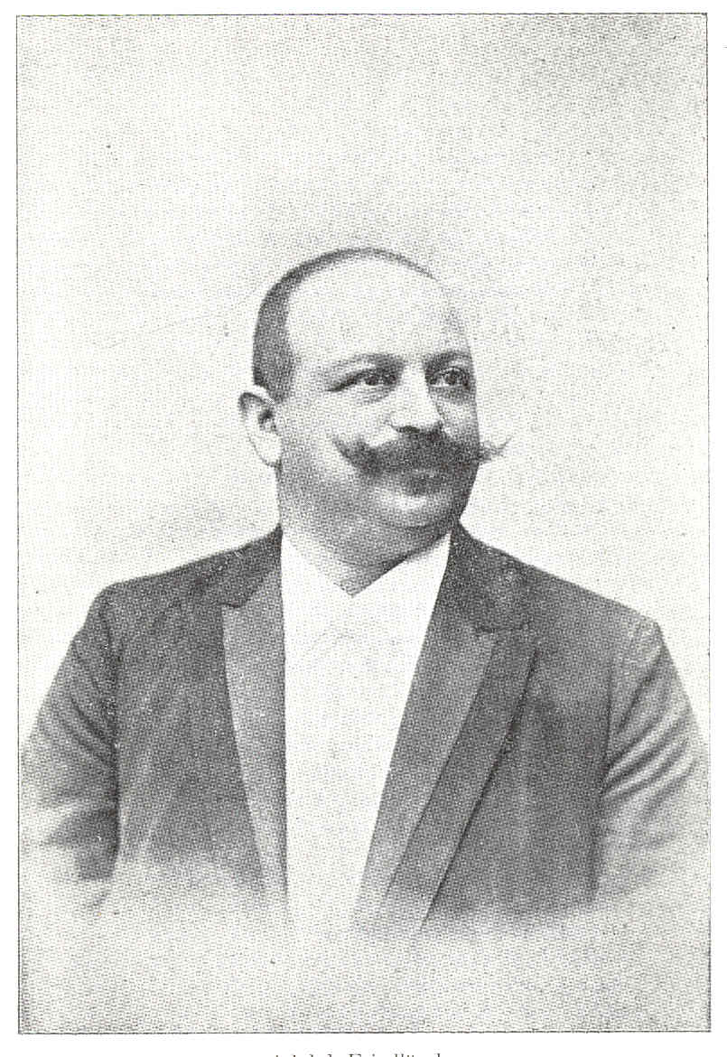 Adolph Friedländer (1851-1904) Deutscher Lithograph